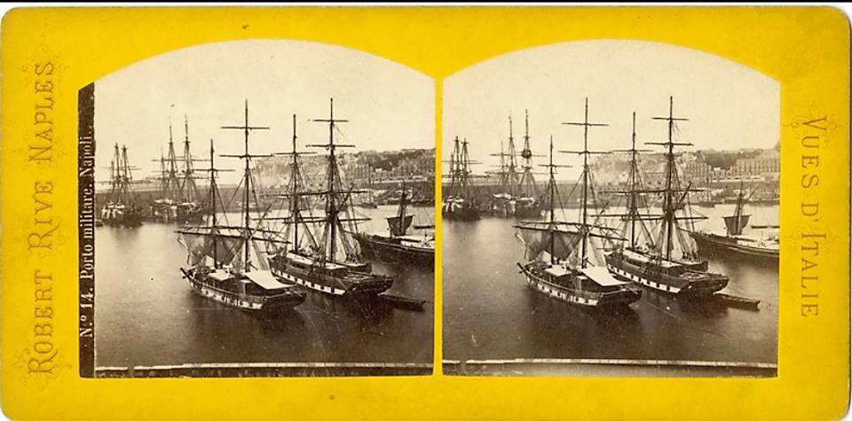 Roberto Rive (18?-1889), "Napoli - Porto militare". Stereofotografia. Numero di catalogo: 14.